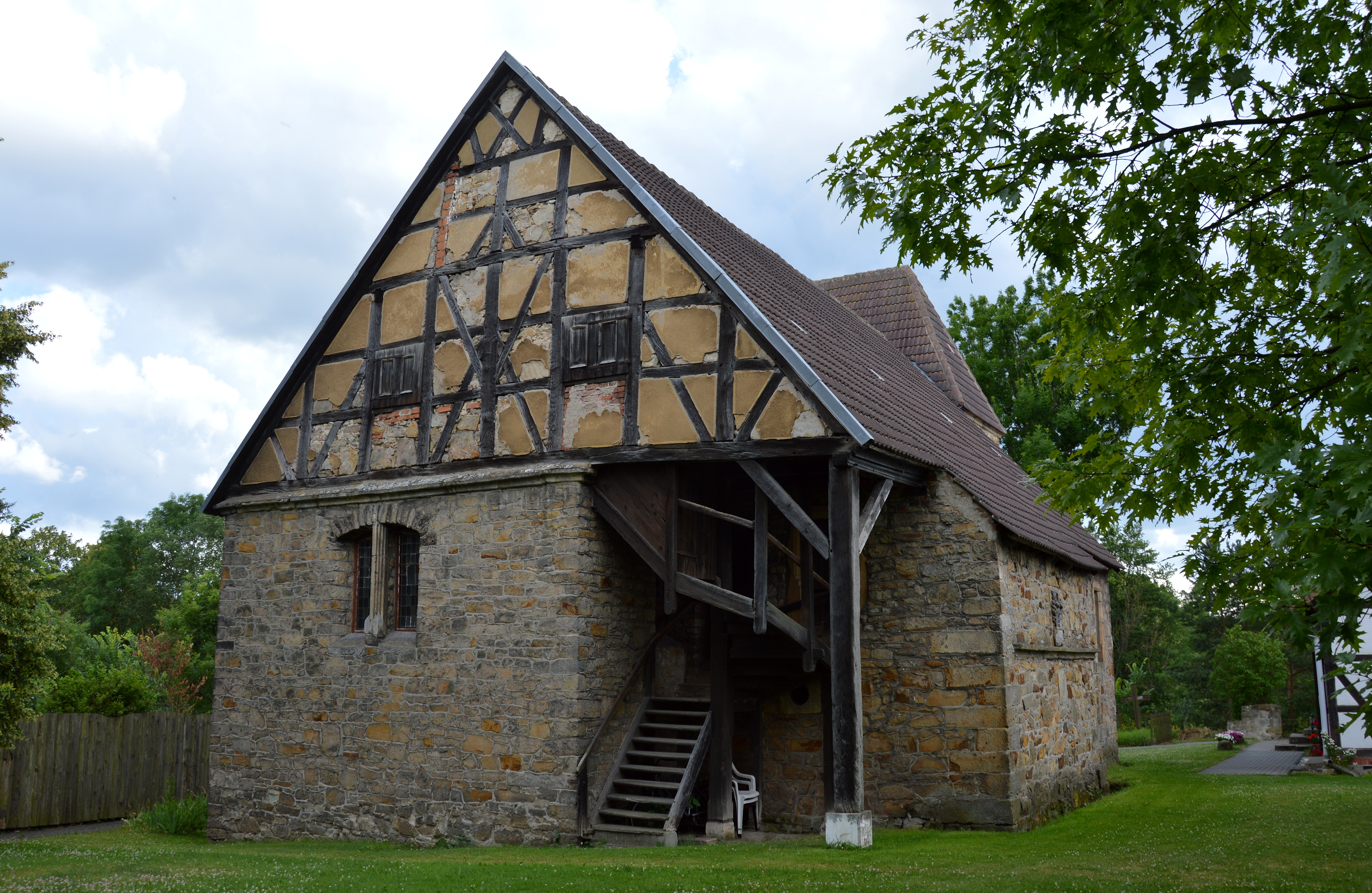 Dorfkirche Groß Bartensleben